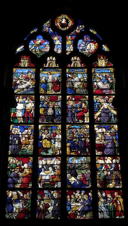 Maîtresse-vitre de l'église Saint-Ouen aux Iffs (35).